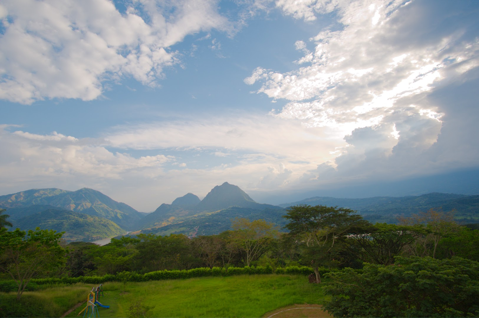 Esta fotografía fue tomada en el municipio colombiano con código 05390.